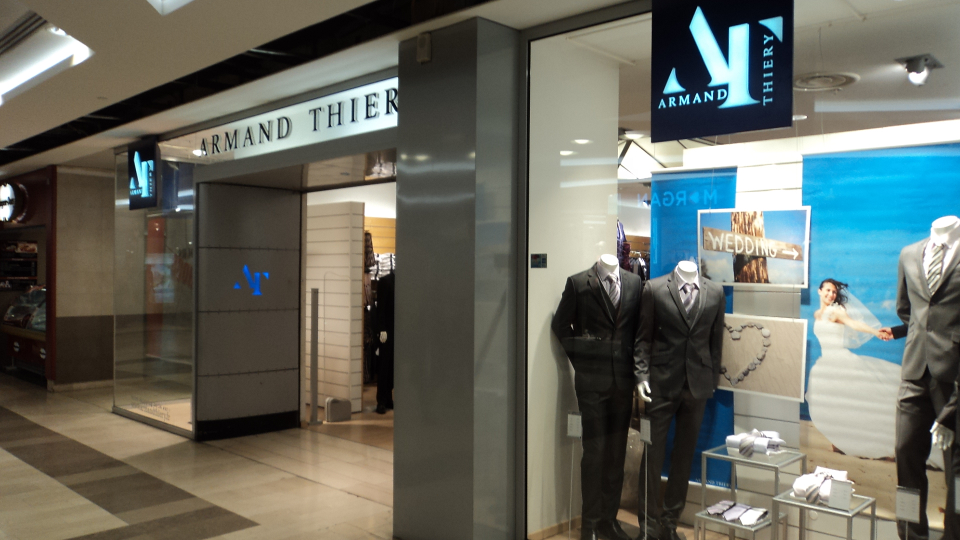 Italie 2 Commercial Centre